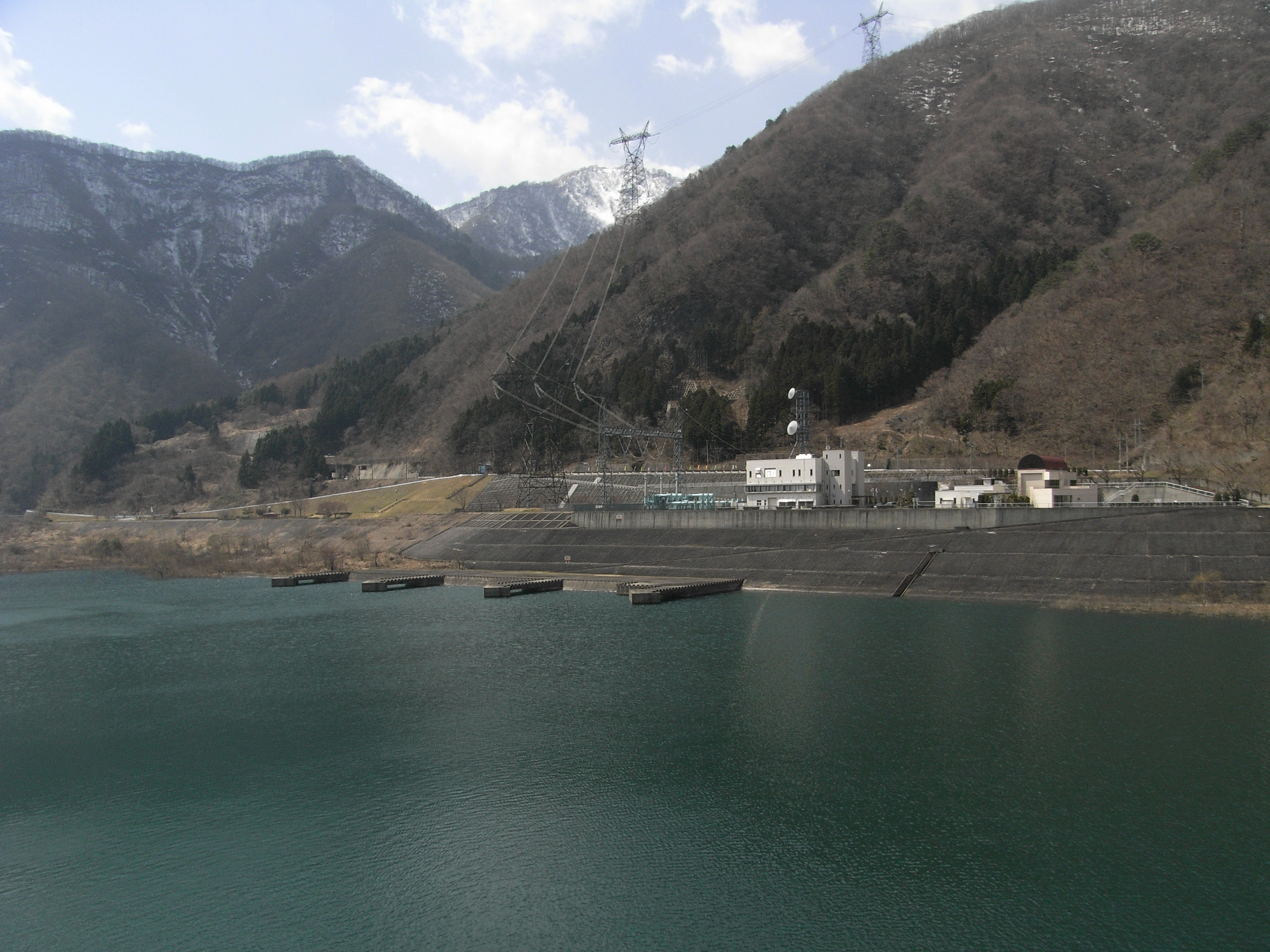 power station